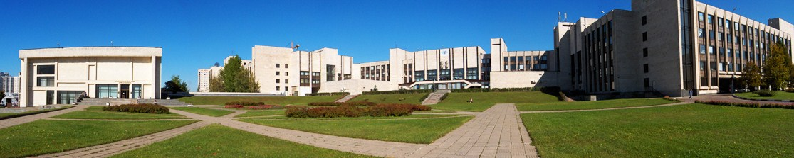 МГИМО (у) МИД РФ